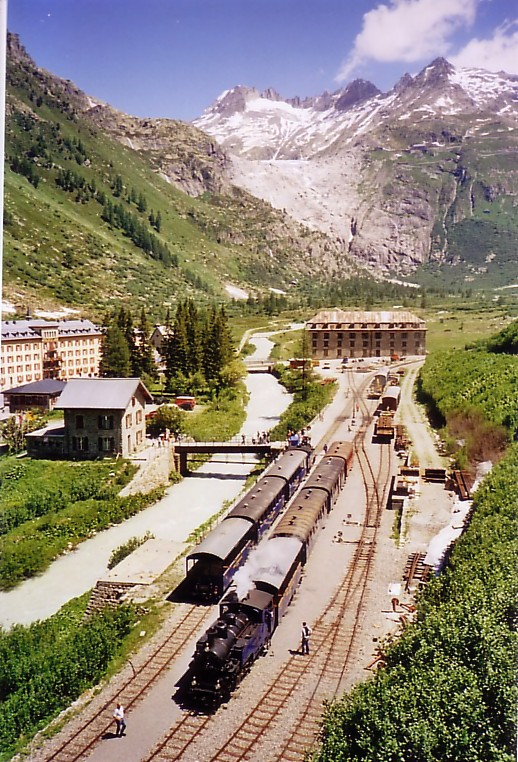 Zwei Züge der Dampfbahn Furka-Bergstrecke (Meterspur Adhäsions- und Zahnradbahn), in der Station Gletsch 1762m, im Juli 2006.